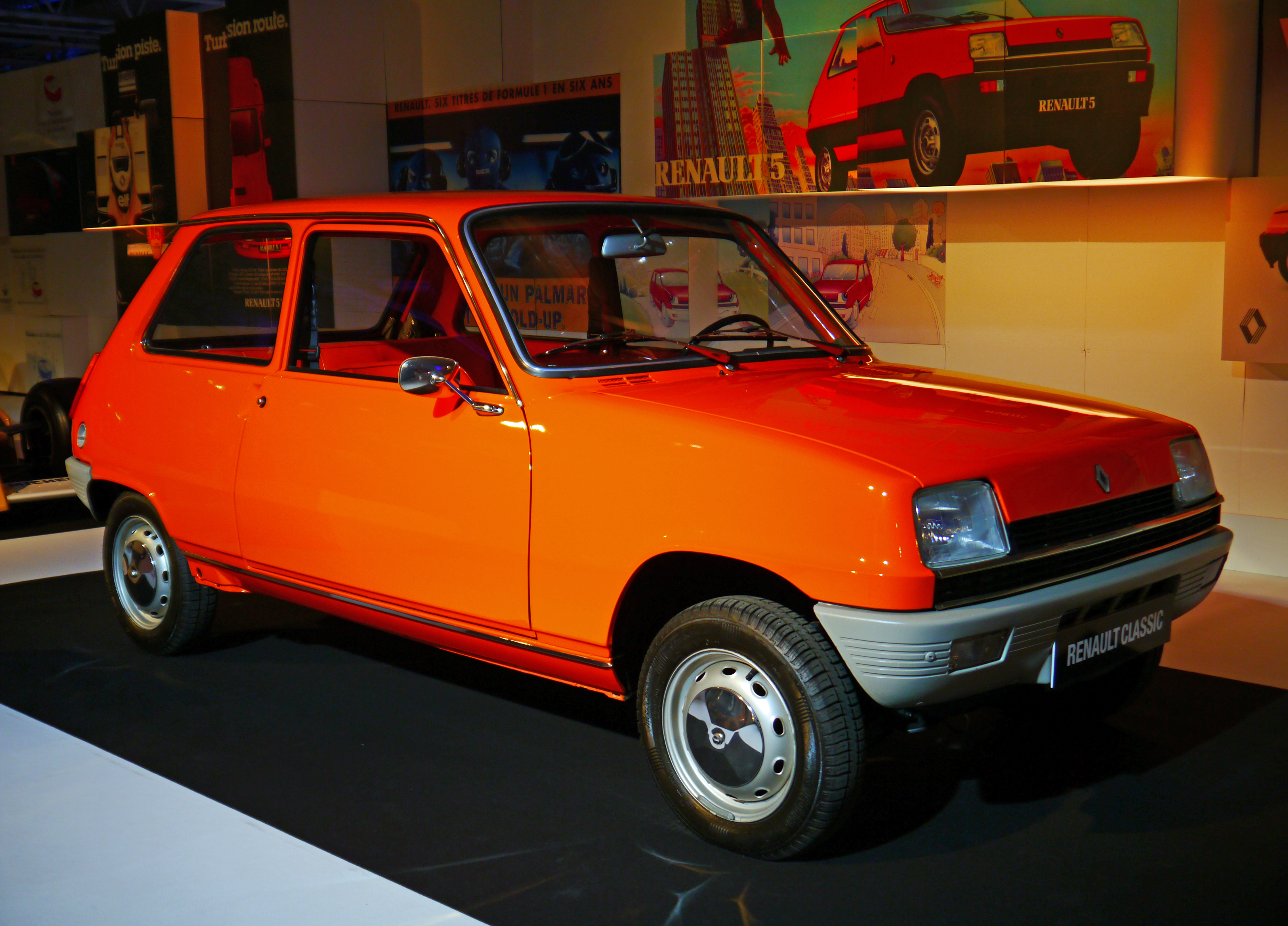 1973 Renault 5 TL. 4-cylinder 956 cc engine (34 bhp).